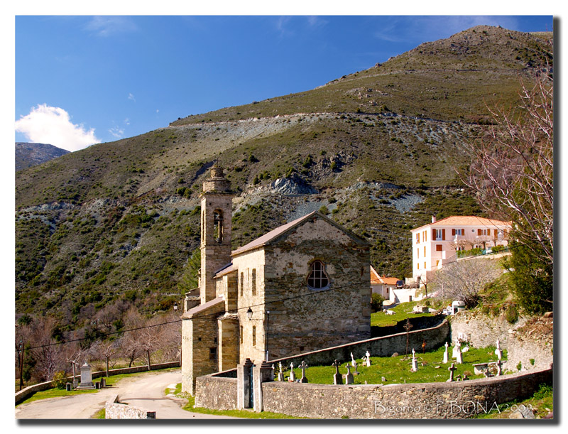 Bigorno (Corse) - Église Santa-Maria-Assunta